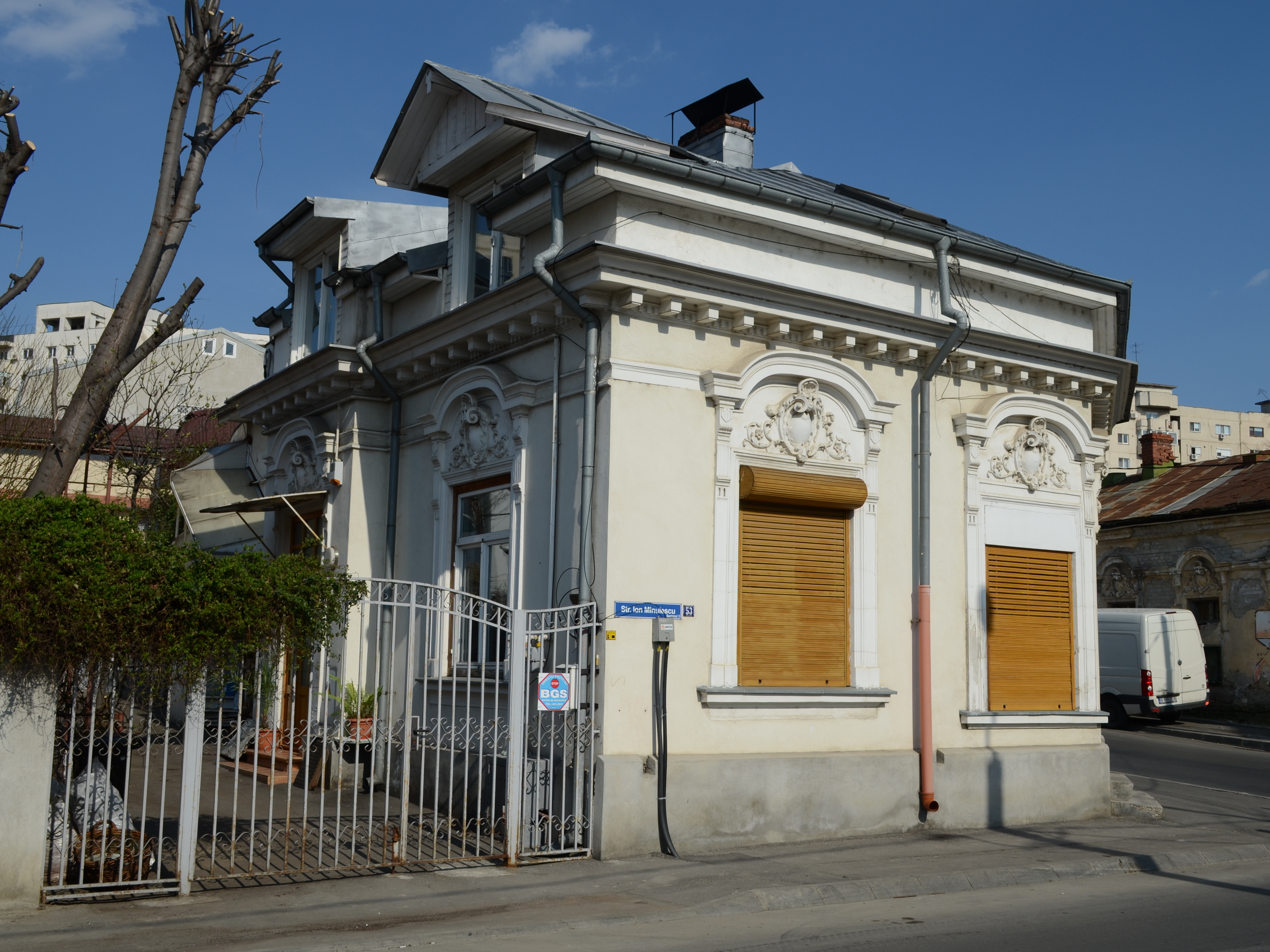 Casă, Str. Ion Minulescu nr. 53